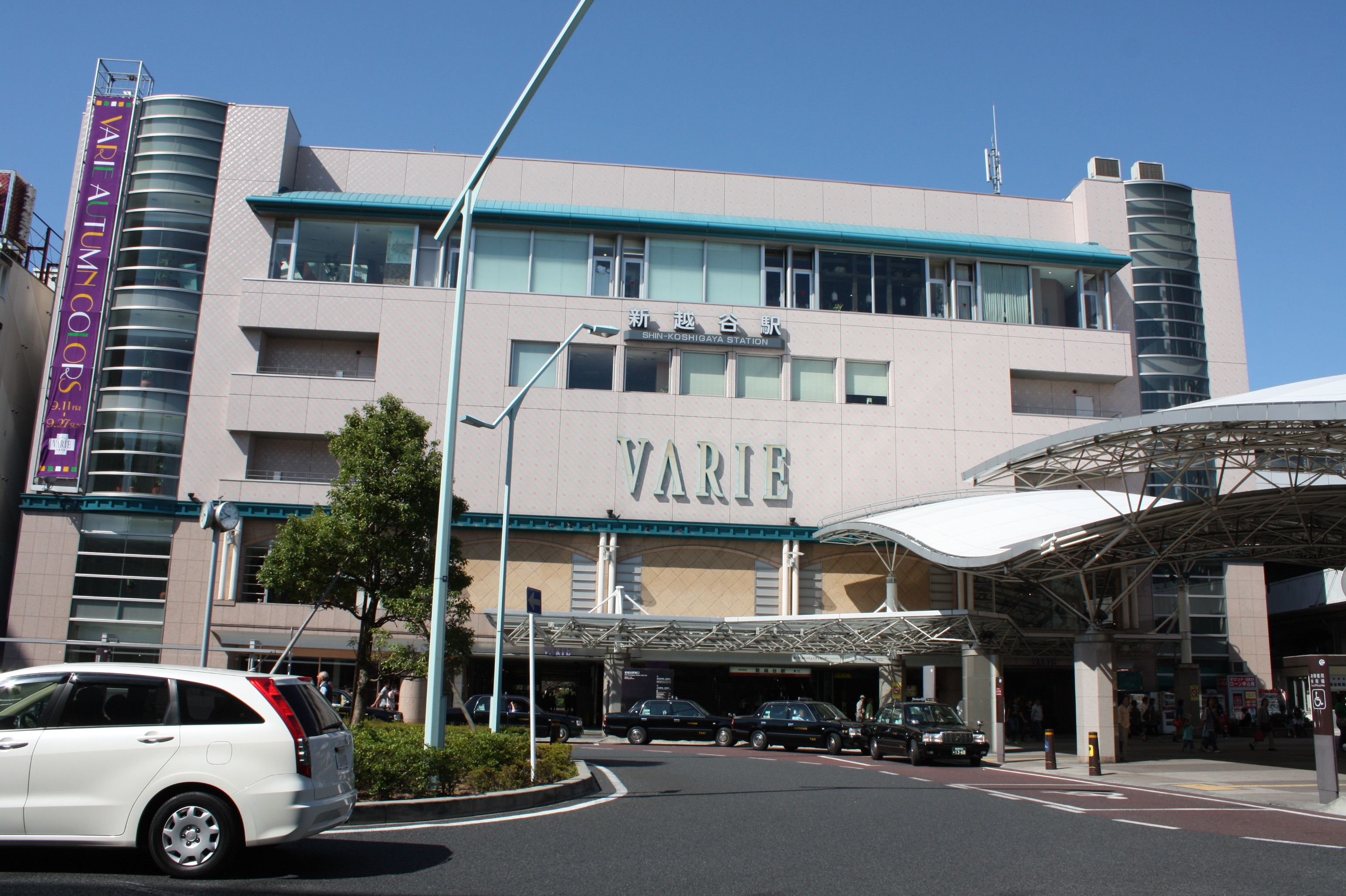 新越谷駅東口